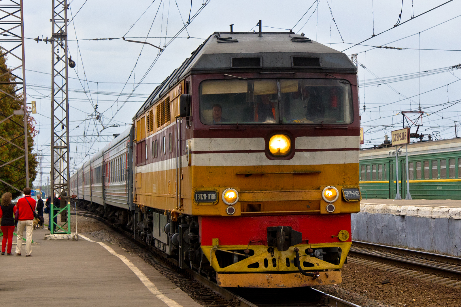 Первый тепловоз ТЭП70 3-его типа, был разбит в крушении в Тамбове. Под его номером работает другой тепловоз (На фото). Ст. Ожерелье